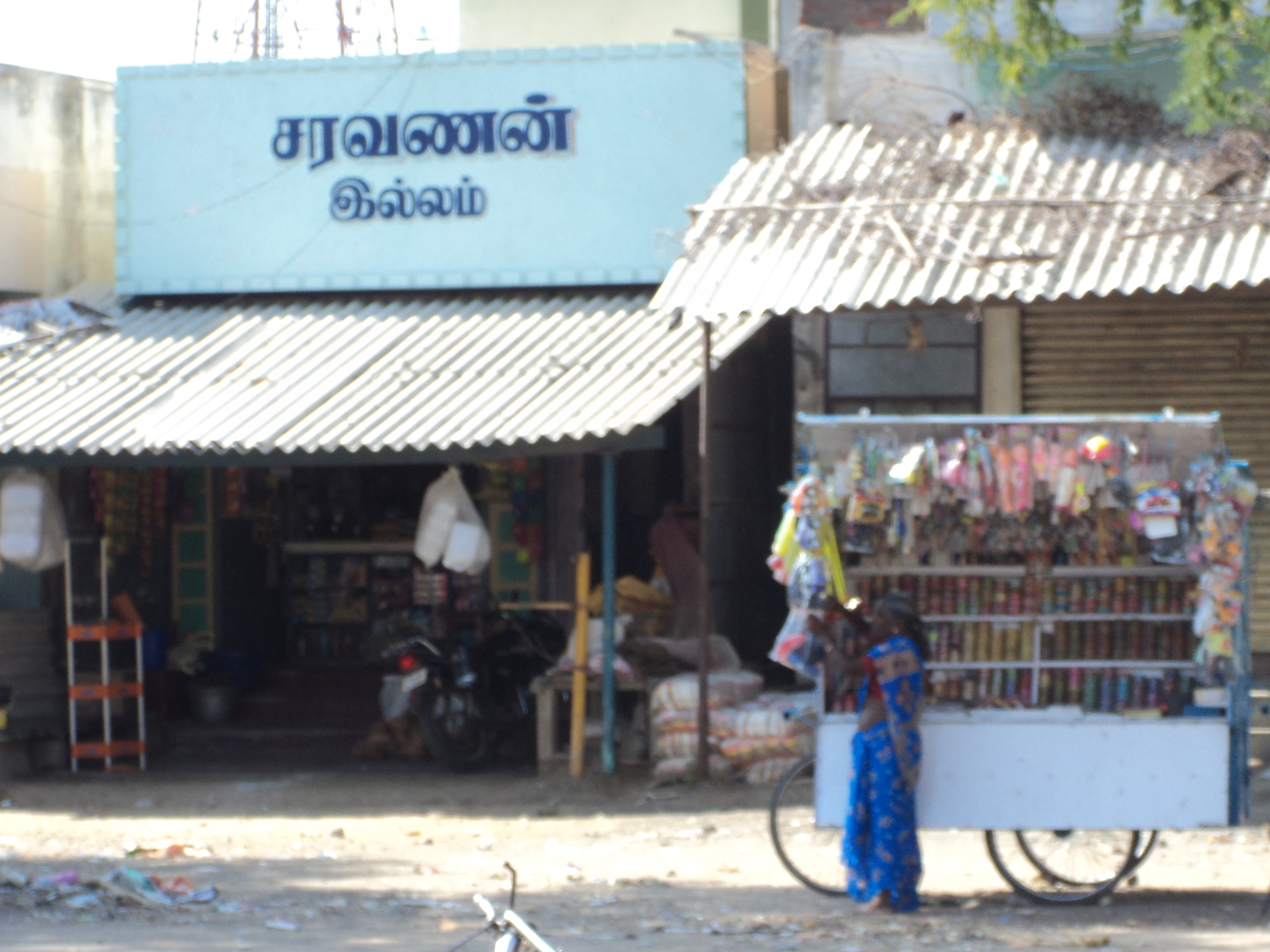 rural areas in Tamil Nadu, India.